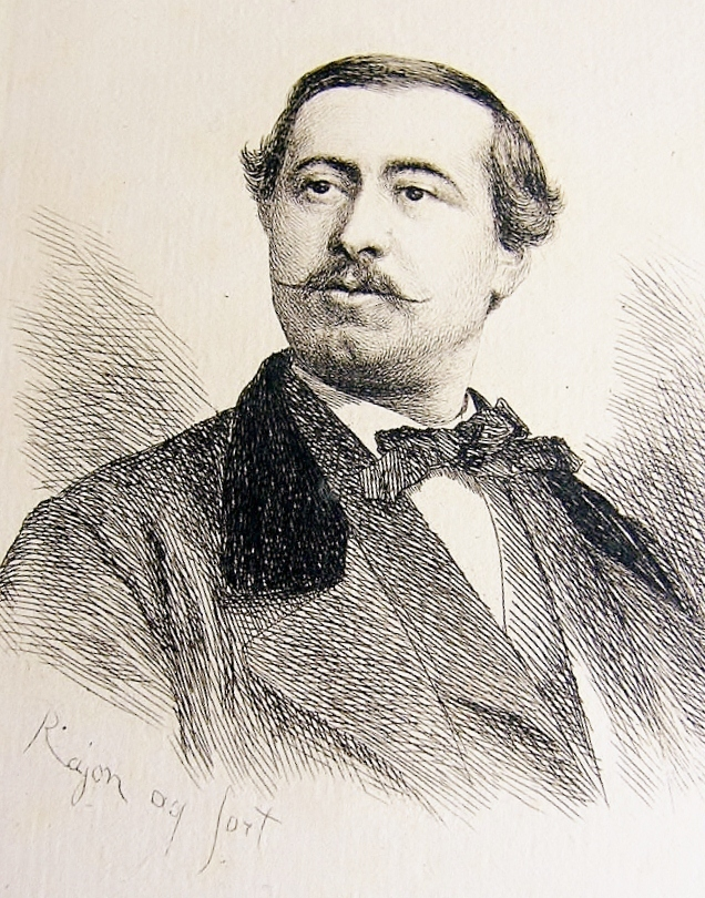 Portait d'Achille Millien, gravure à l'eau forte de Paul Adolphe Rajon (1843-1888), d'après une photographie de 1866, et parue en 1877 dans le recueil de poésie d'Achille Millien Premières poésies (1859-1863).